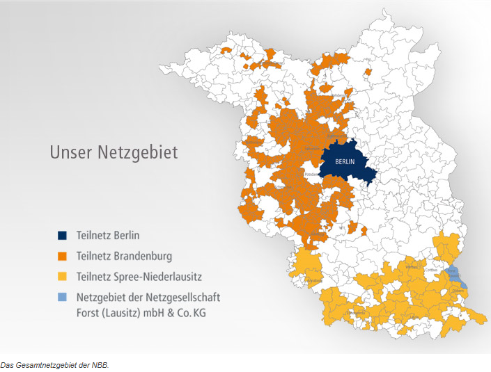 NBB Netzkarte